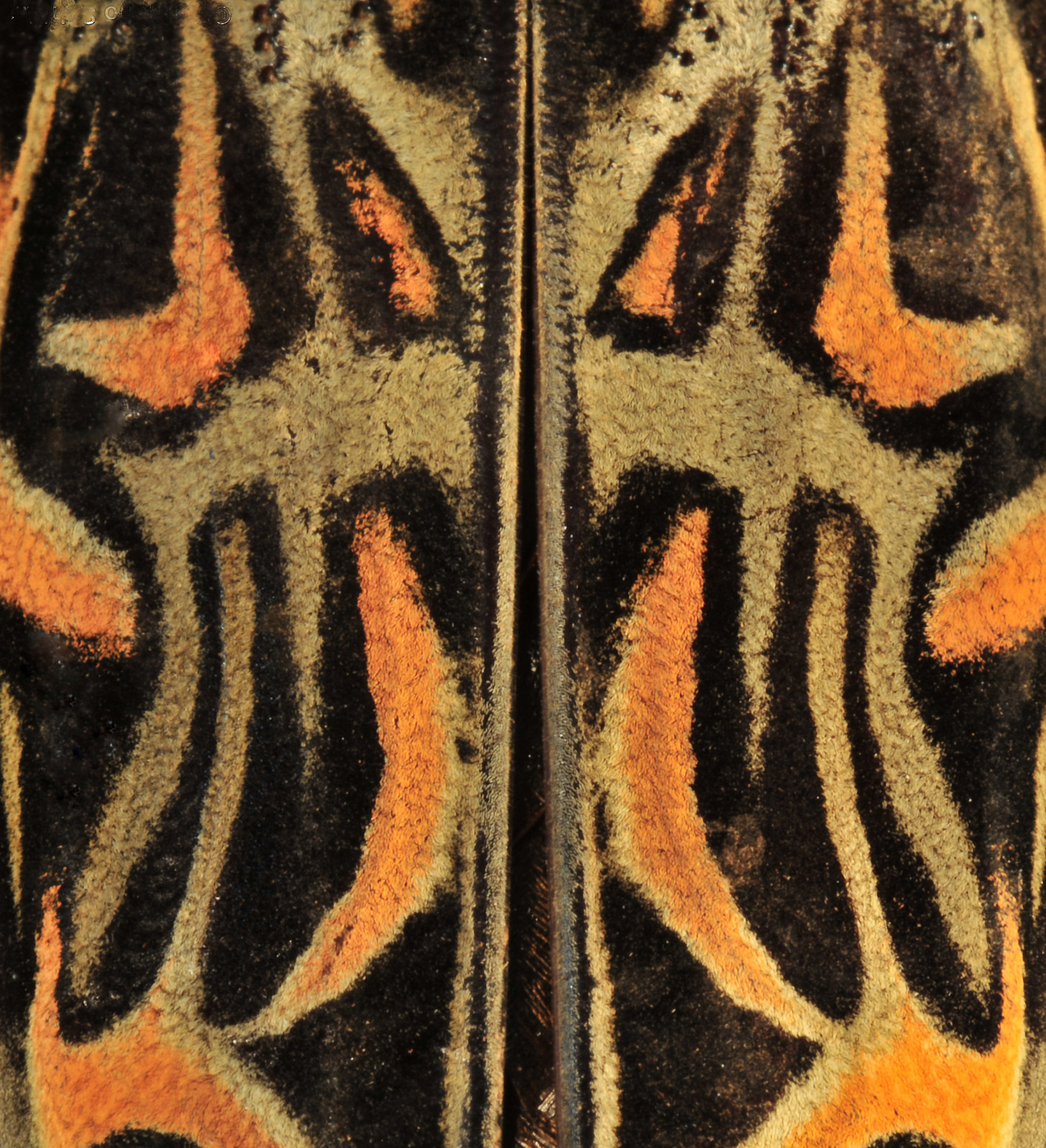 O Besouro-da-figueira (Acrocinus longimanus) é um besouro da família dos cerambicídeos, de ampla distribuição brasileira, cujas larvas são brocas de figueiras e de outras plantas silvestres. Possuem cerca de 7 cm de comprimento, coloração de fundo preto, e são ornamentados na cabeça, pronoto e élitros por desenhos vermelhos e cinzentos. Os machos destacam-se pelo desenvolvimento das patas anteriores, que chegam a atingir o dobro do comprimento do corpo. Também são conhecidos pelos nomes de arlequim, arlequim-da-mata, arlequim-grande e broca-da-jaqueira. Wikipedia